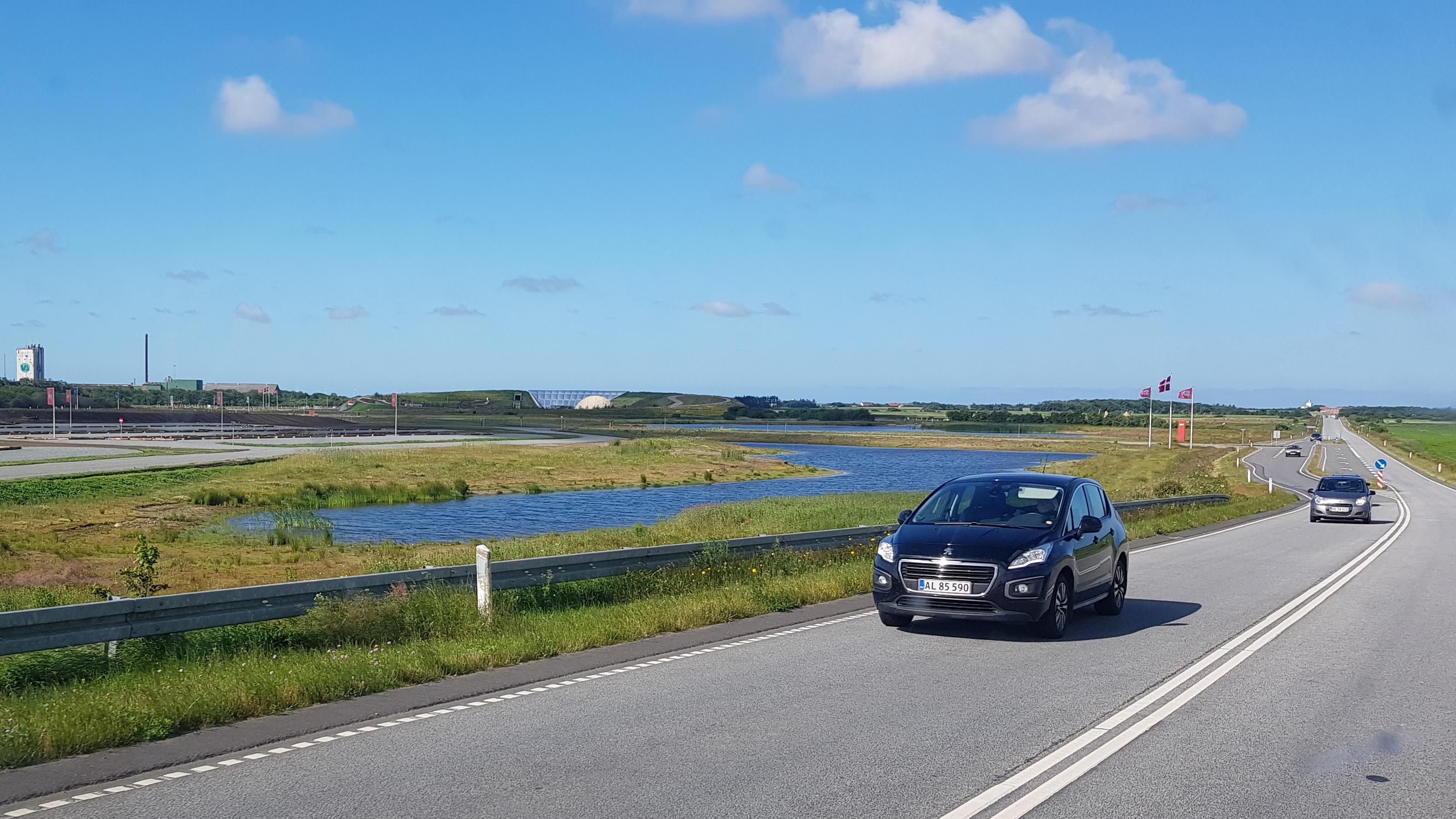 Naturkraft ved Ringkøbing